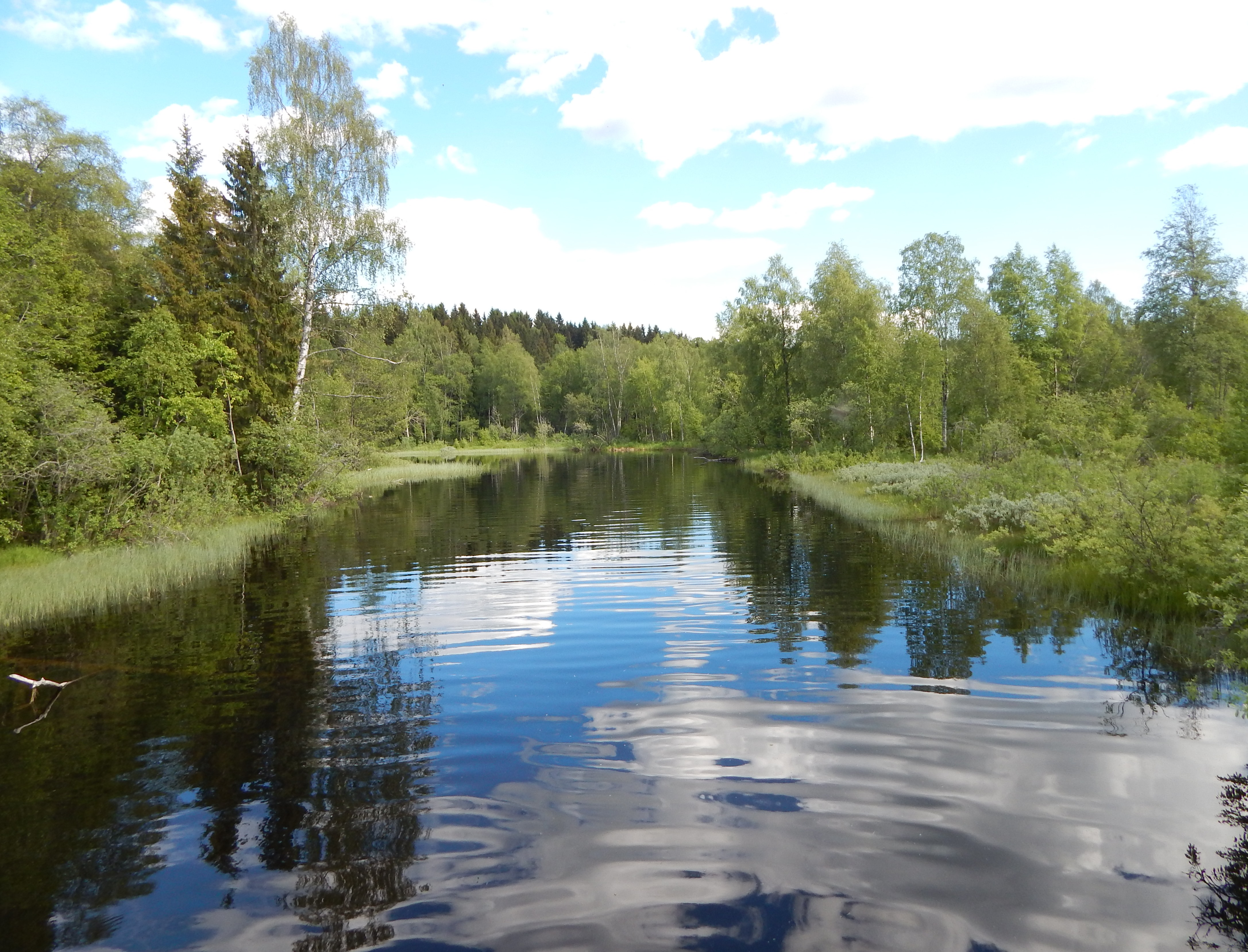 Dausjøelva like ved Greveveien nord for Maridalsvannet